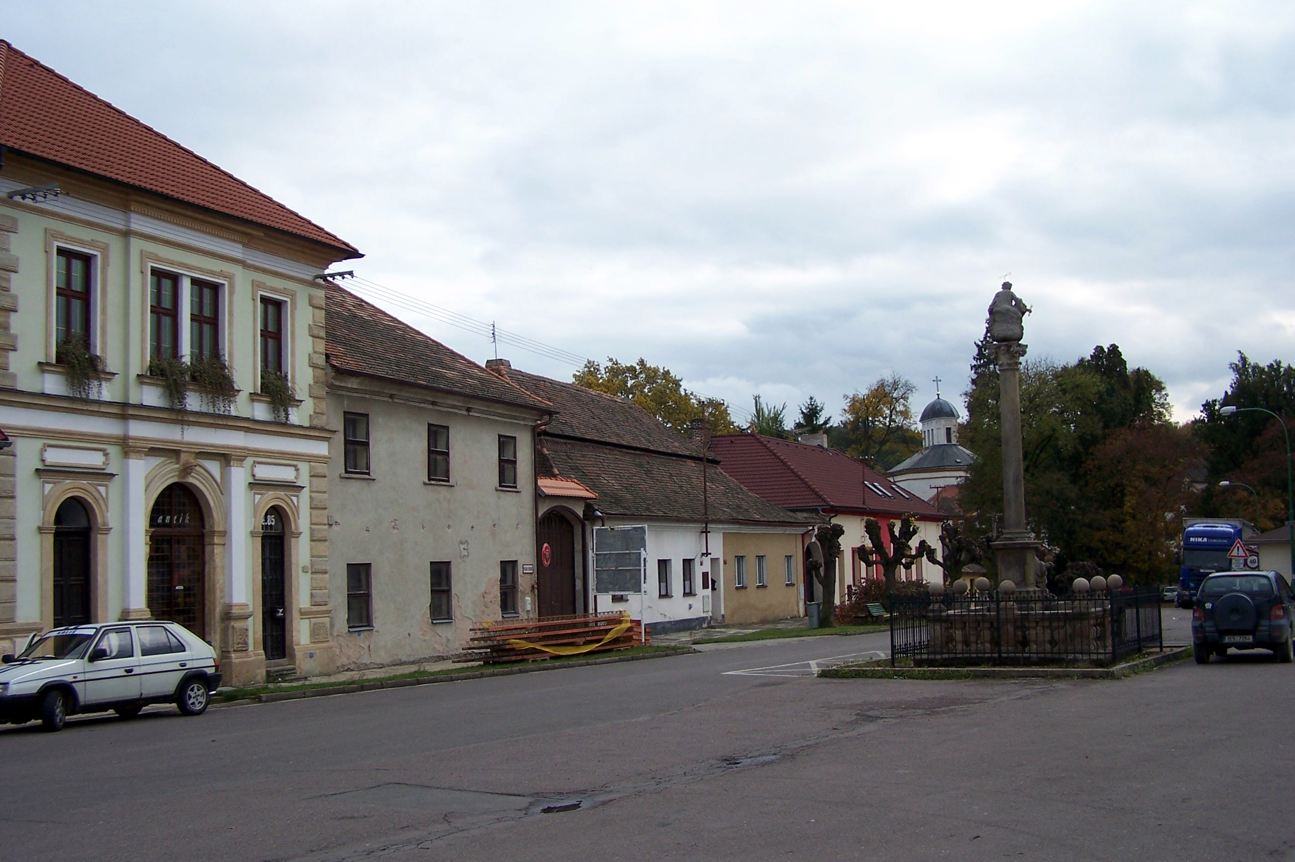 Náměstí Sv. Trojice v Cholticích s trojičním morovým sloupem.